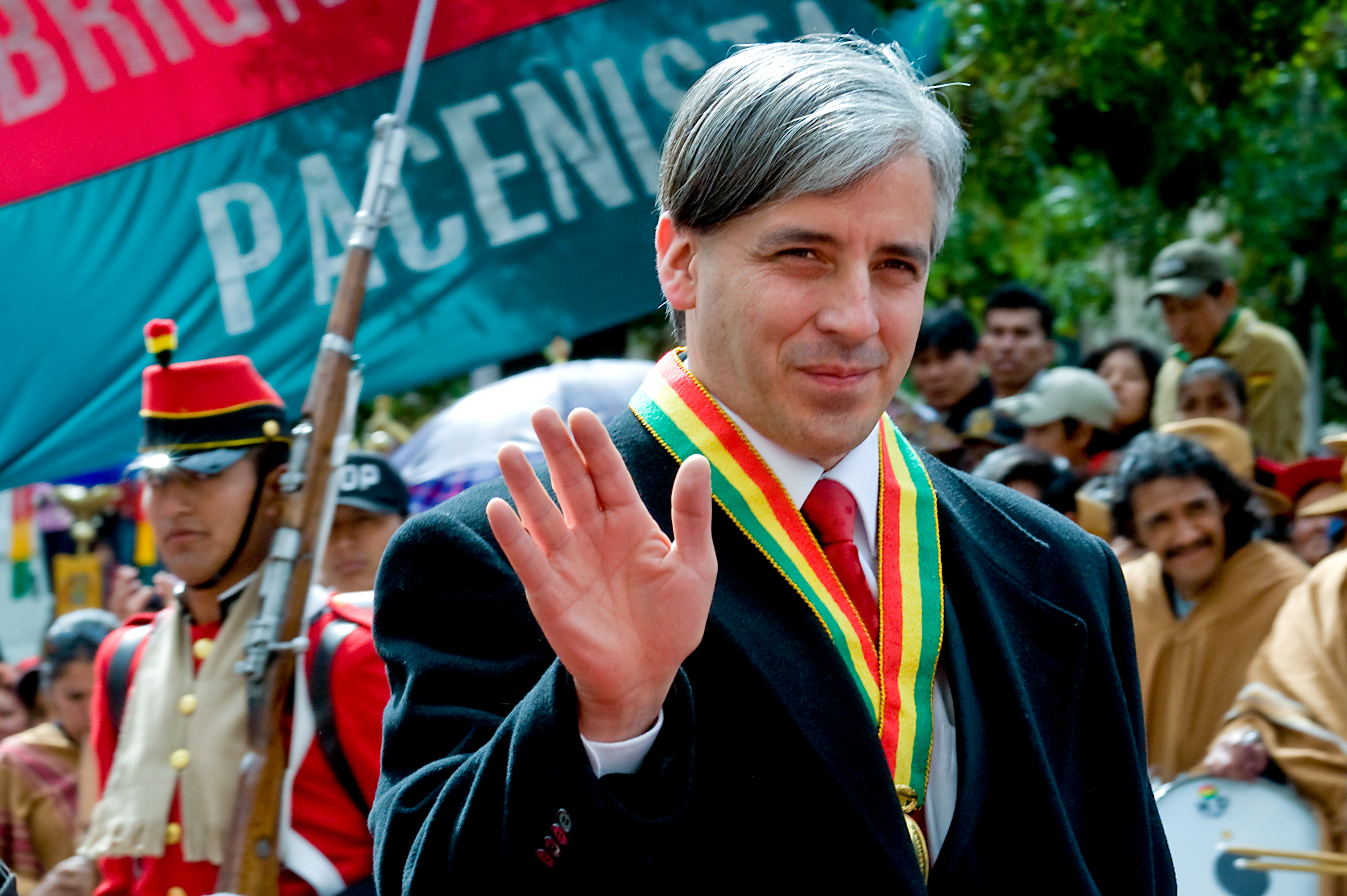 Álvaro Marcelo García Linera